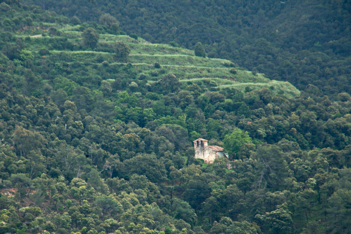 Ermita de Sant Cristòfol de Monteugues (s.XI-XII) al municipi del Figaró-Montmany. Vista des de Can Plans